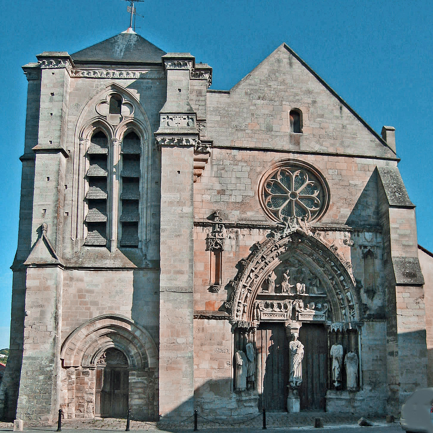 Basilique, façade du 12ème siècle, Longpont-sur-Orge